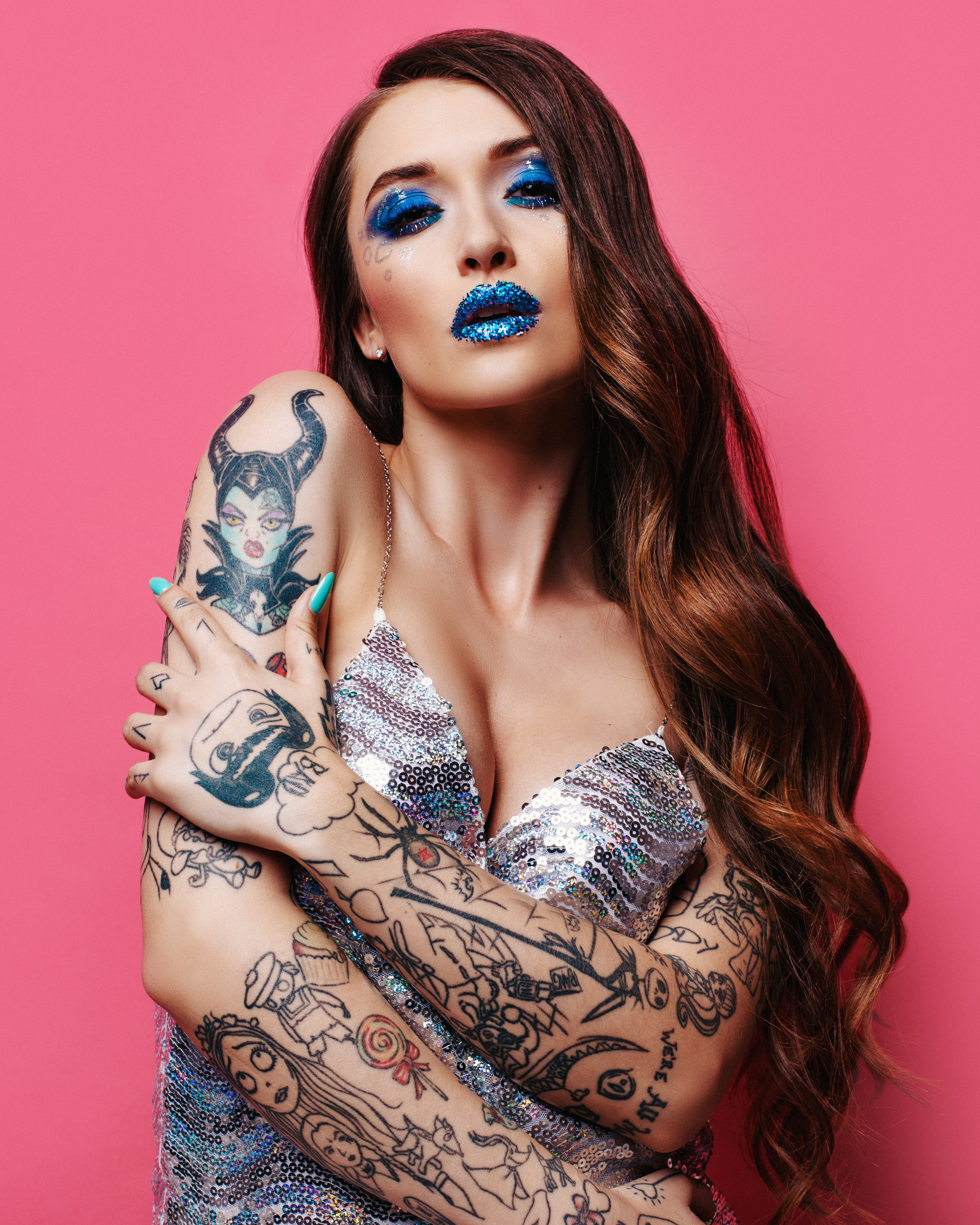 Ateliérové foto